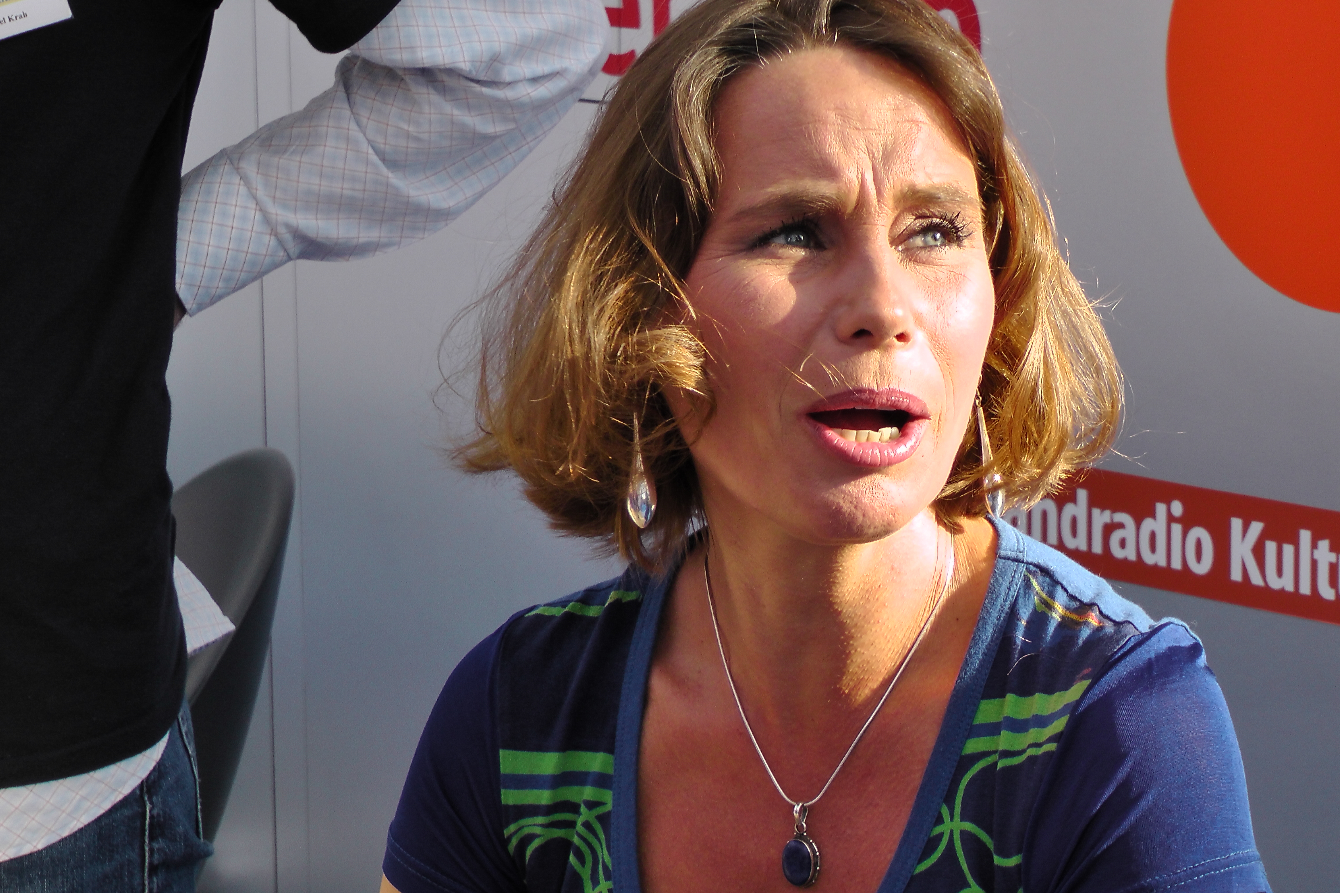 Marie Theres Kroetz-Relin während der Leipziger Buchmesse 2011.